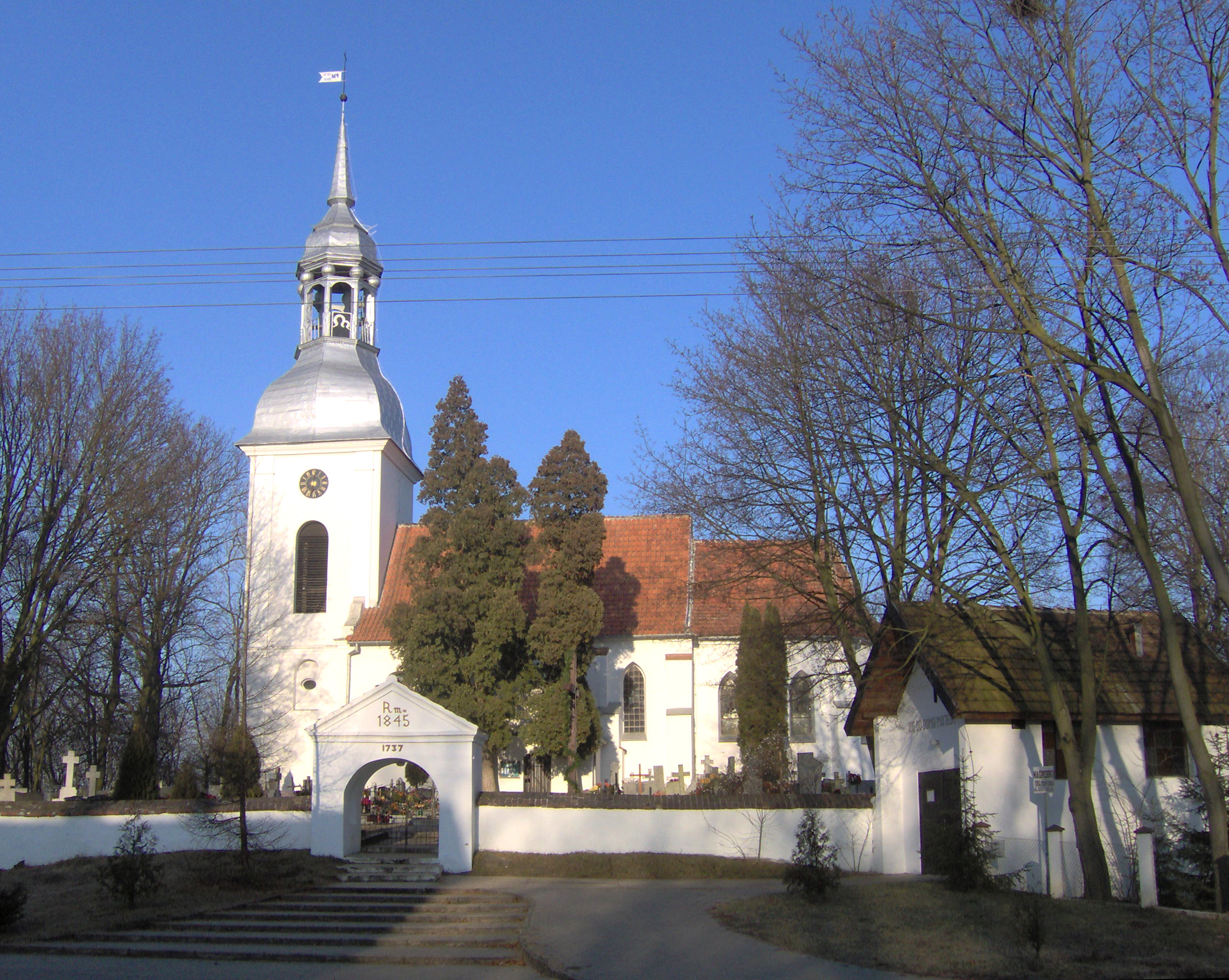 Church in Ostromecko